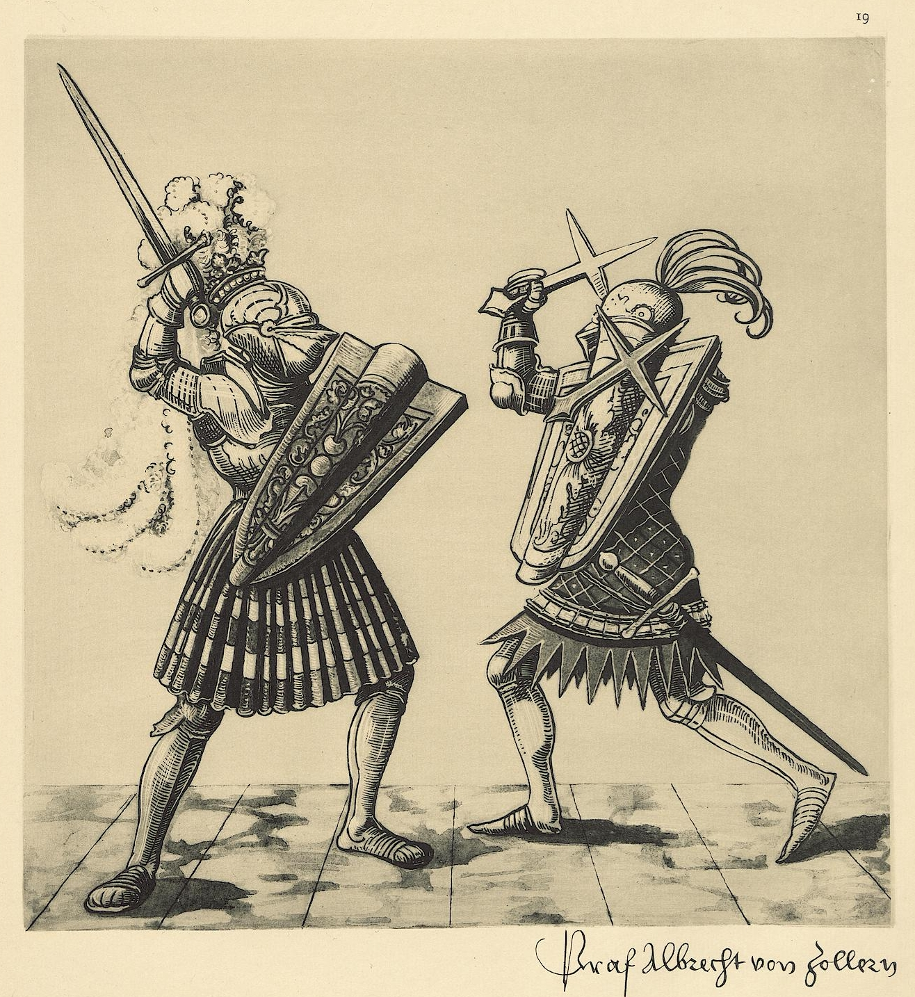 Tafel aus: Freydal: des Kaisers Maximilian I. Turniere und Mummereien; mit einer geschichtl. Einleitung. Tafeln. Wien, 1882. Exemplar der UB Tübingen. (Faksimileedition des Turnierbuchs Freydal, Kunsthistorisches Museum Wien, Signatur: K.K. 5073) Tafel 19 Graf Albrecht von Zollern